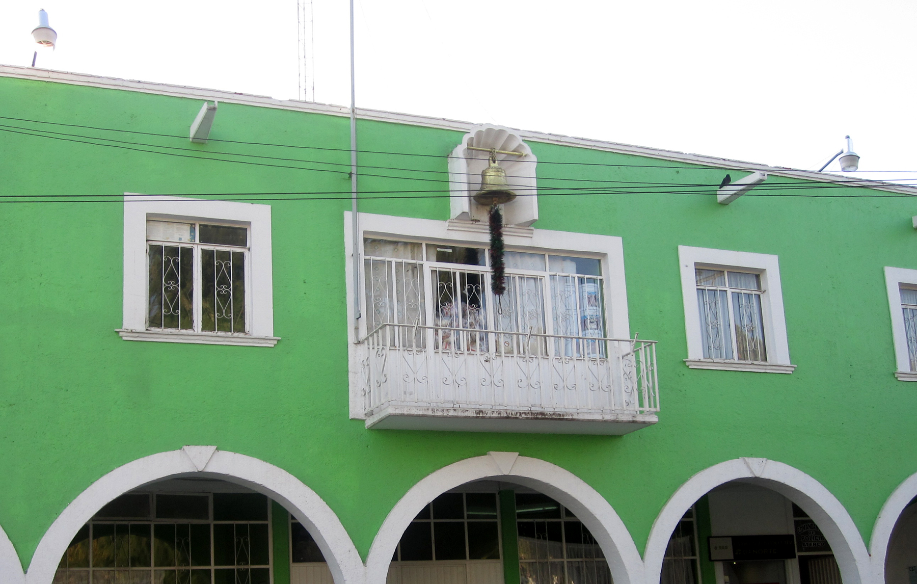 Rådhuset i Atenco kommune i Mexico